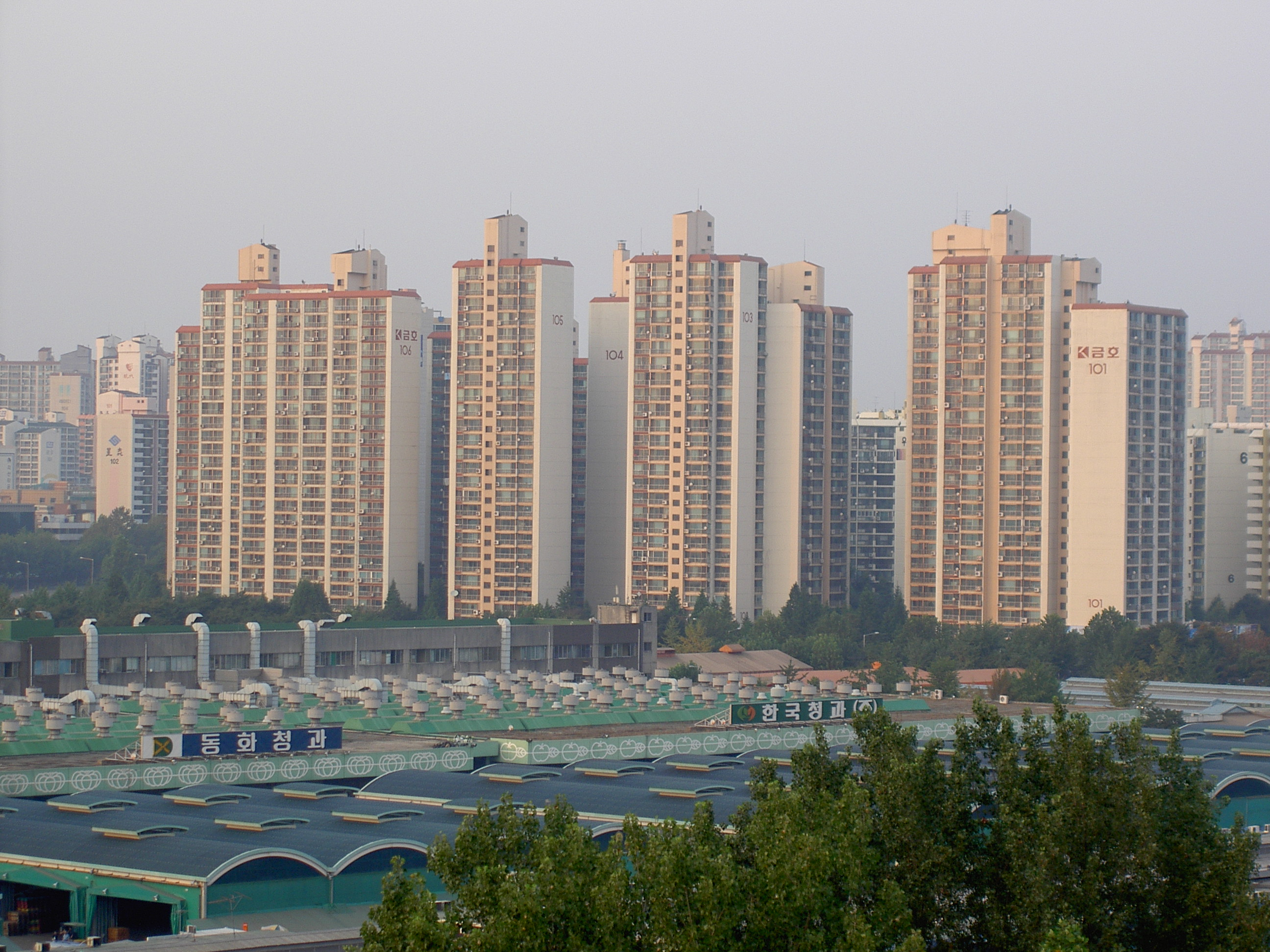 Apartment buildings in Garak-dong, Seoul.